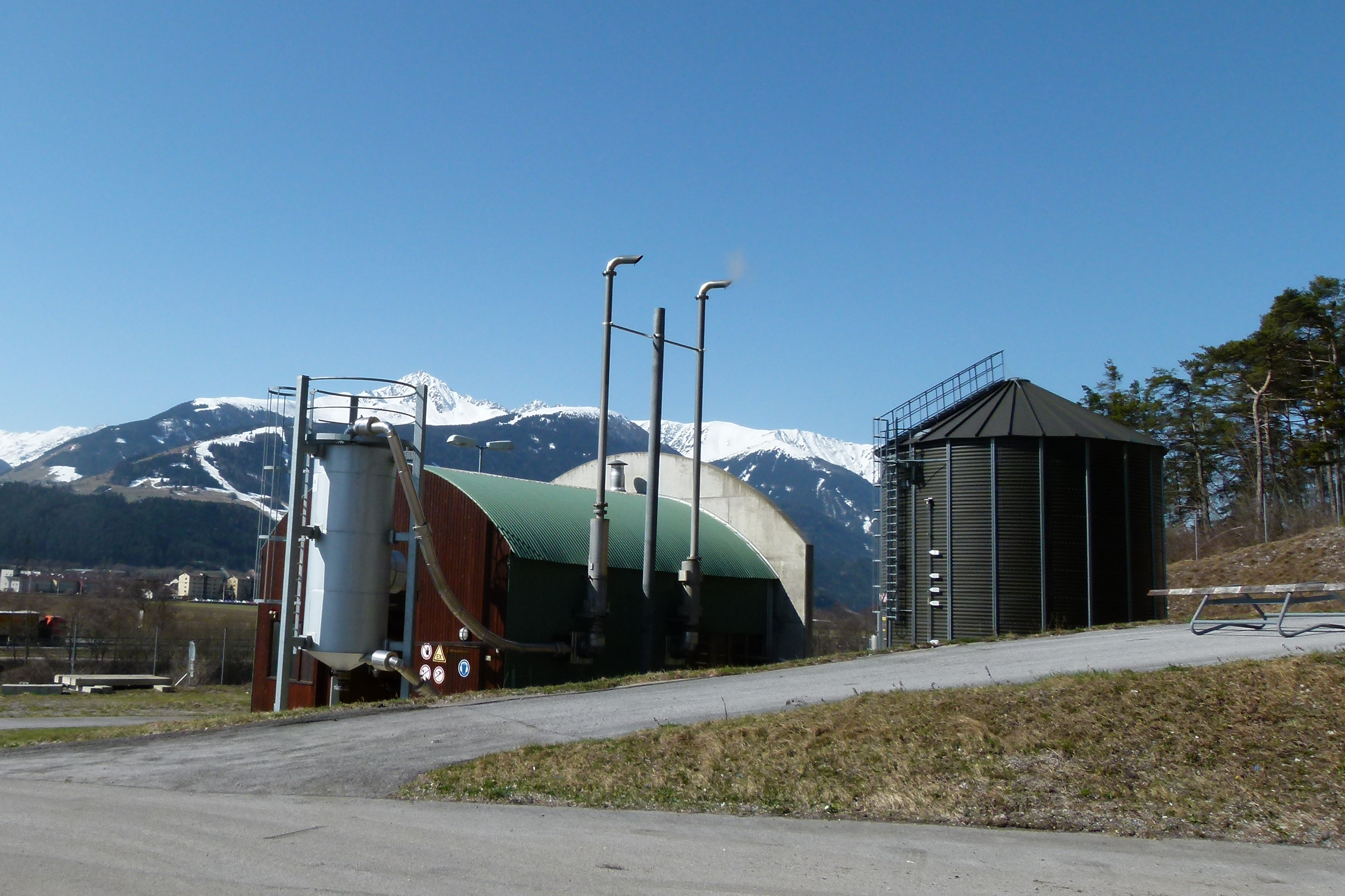 Zirli reoveepuhastusjaama biogaasi mahuti ja koostootmisseade Austrias